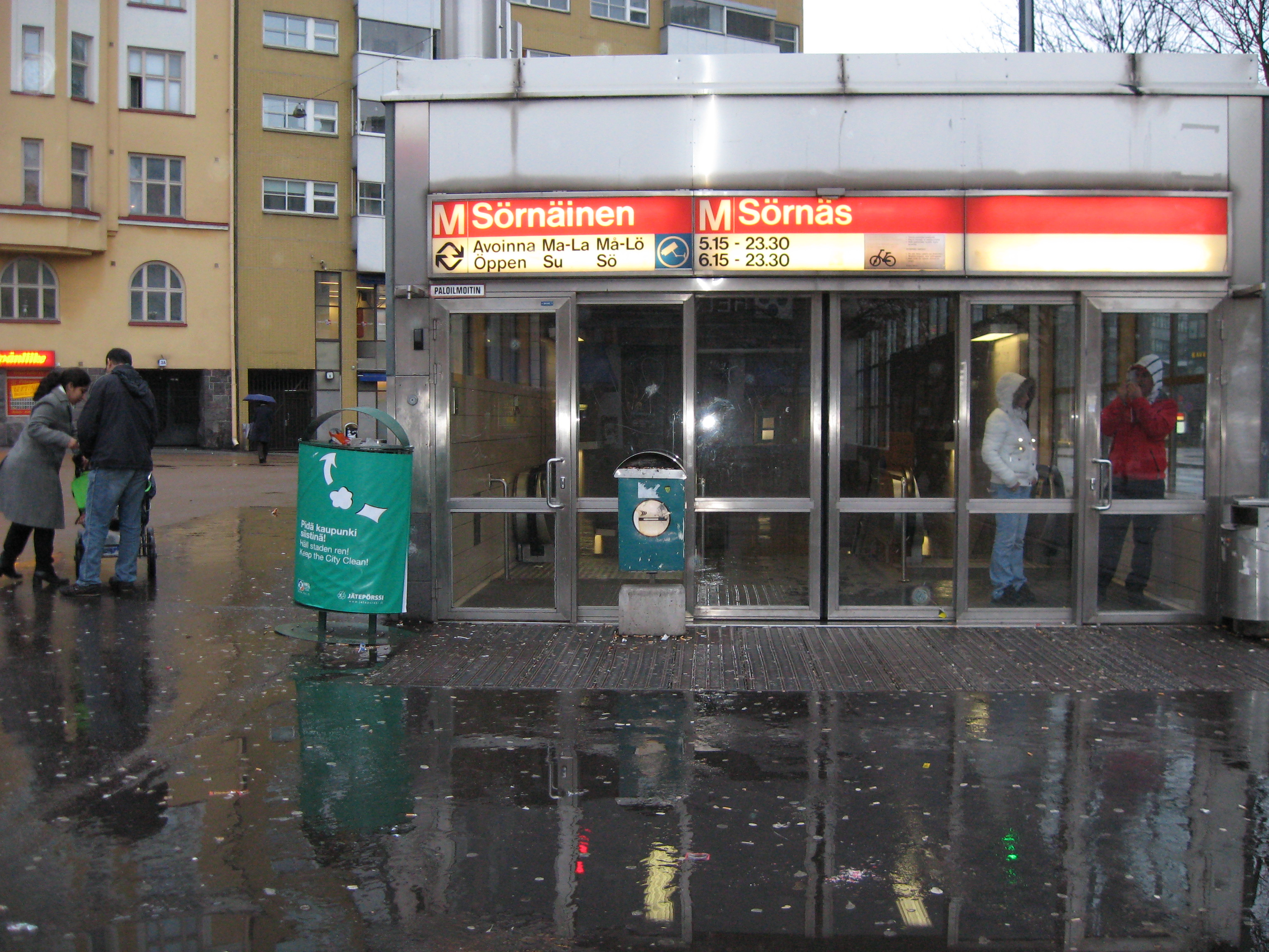 Sörnäisten metroaseman sisäänkäynti